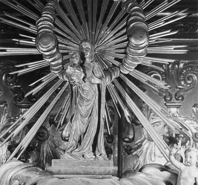 Imatge de la Mare de Déu del Miracle. Joan Roig i Font (1913)